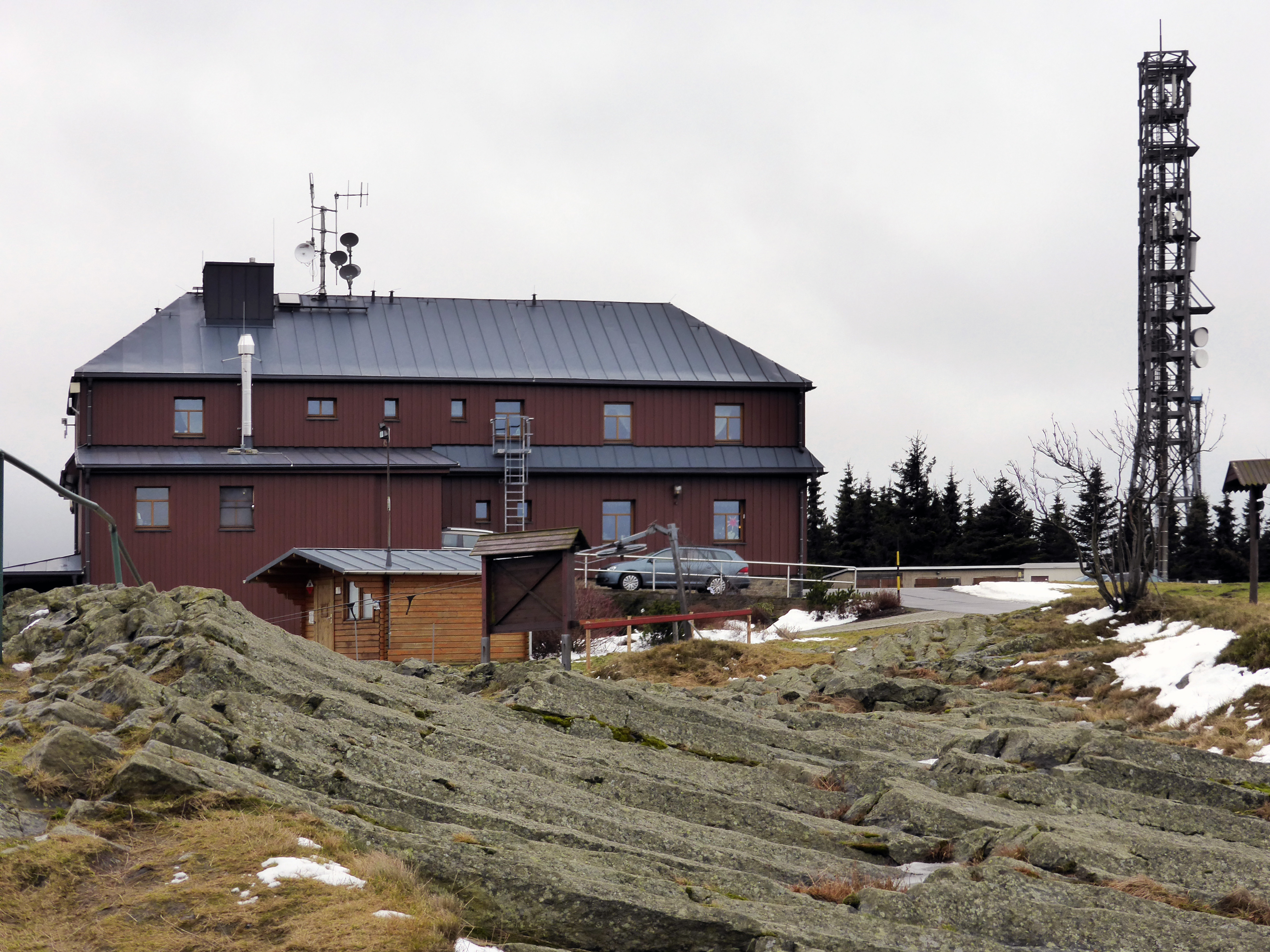 Hirtstein, Ausflugslokal "Hirtsteinbaude".